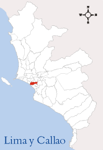 Localización del Distrito de San Isidro Imagen elaborada por --Edgardo Reyes 22:10 9 mar, 2005 (CET) Categoría:Mapas del Perú (imagen)